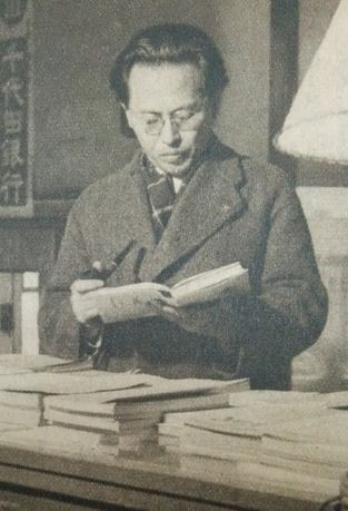 野村俊夫